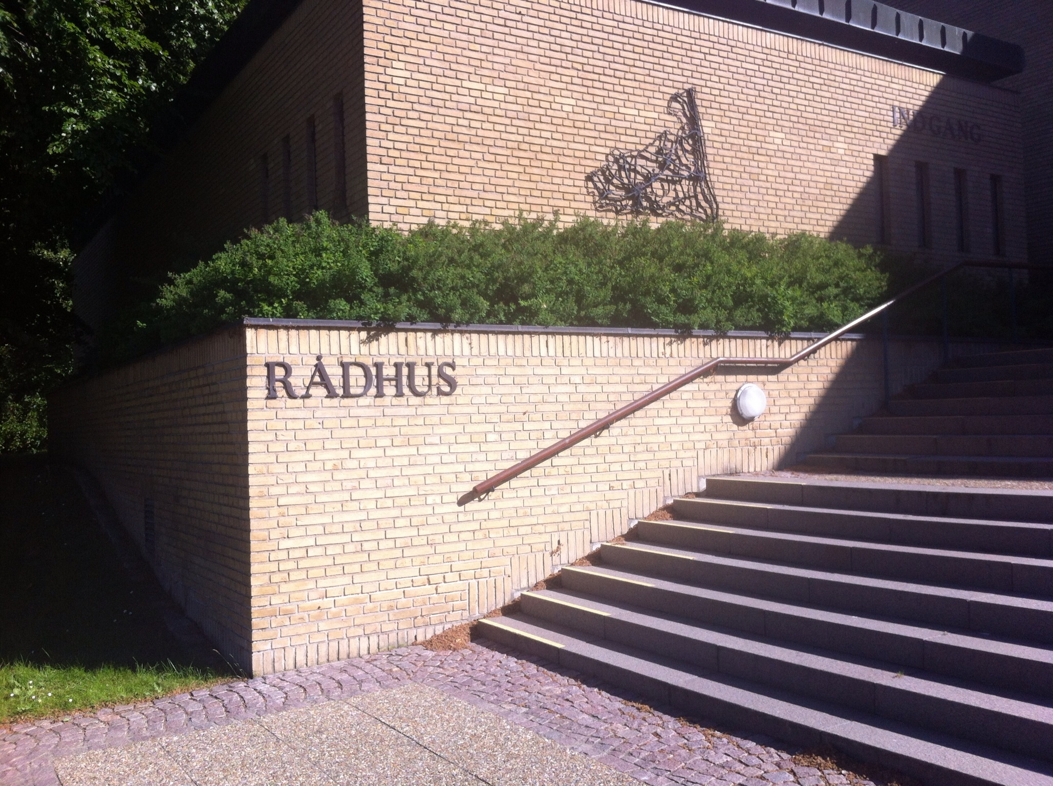 Hovedeindgangen ved Hadsund Rådhus